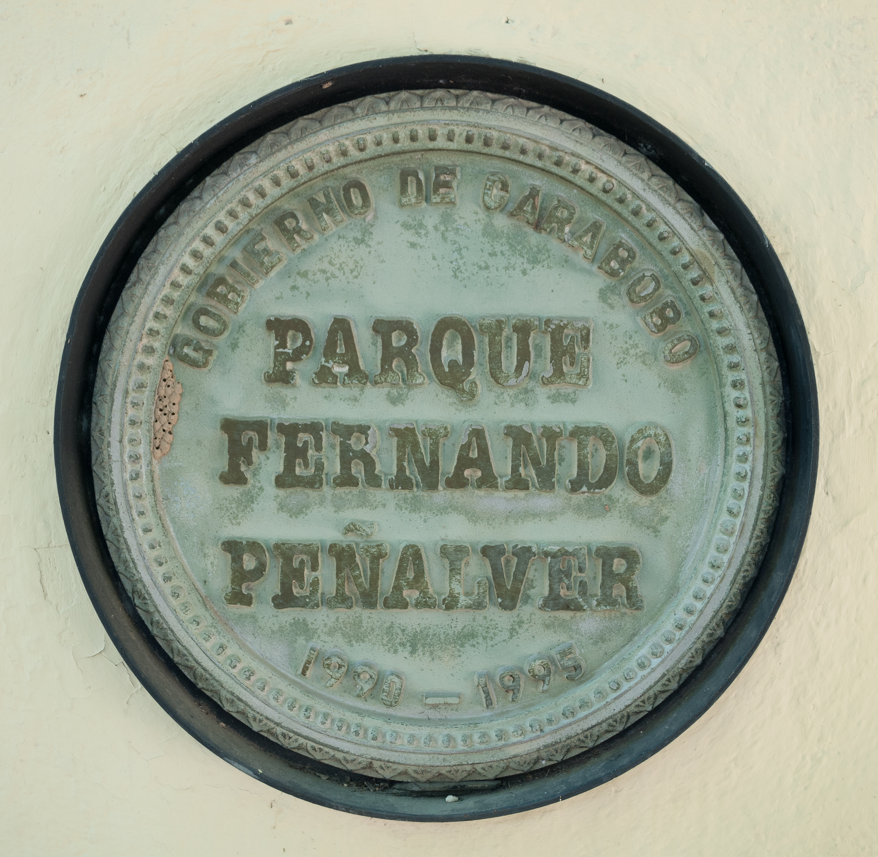 Parque Fernando Peñalver